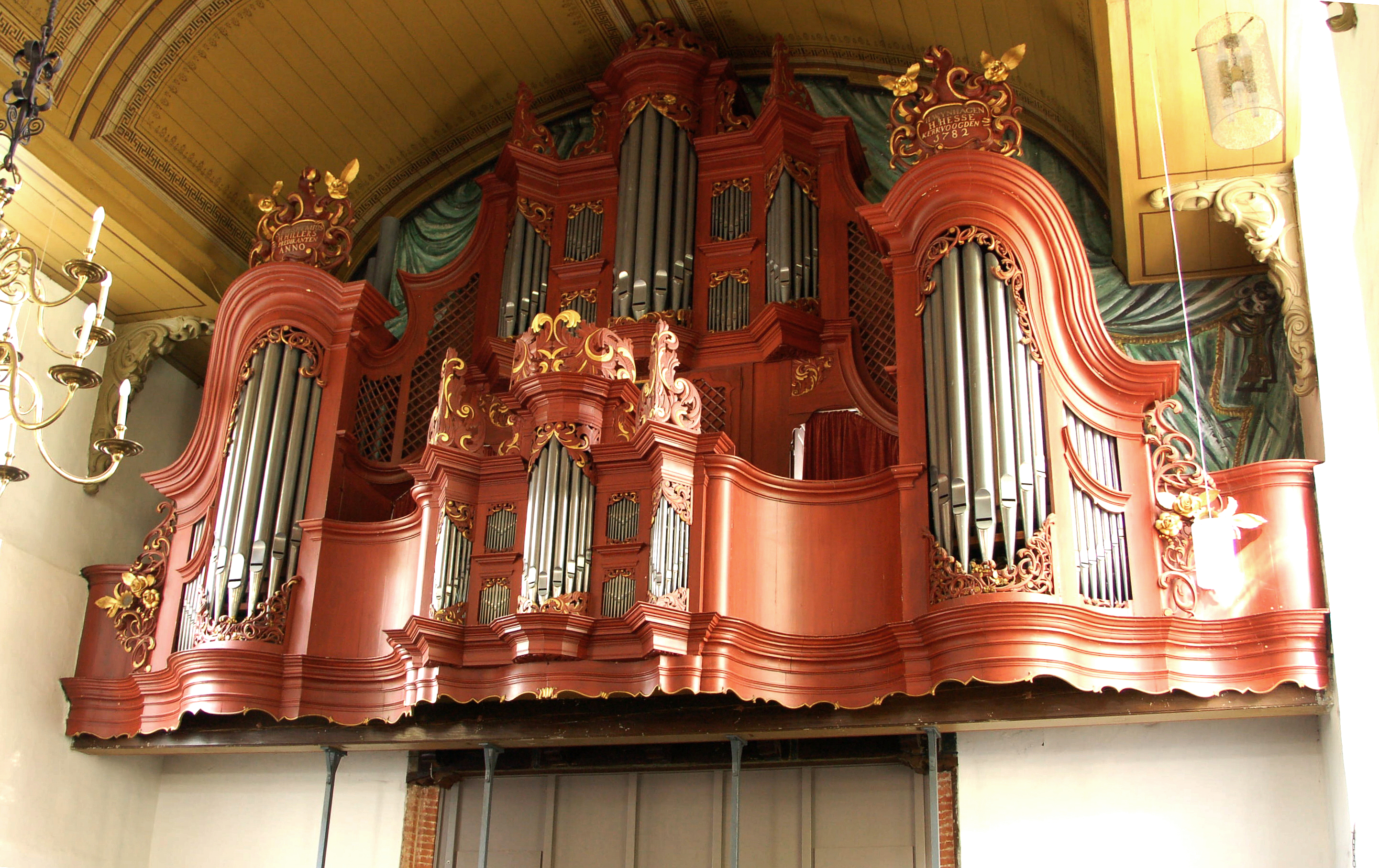 Orgel in Weener, Reformierte Kirche